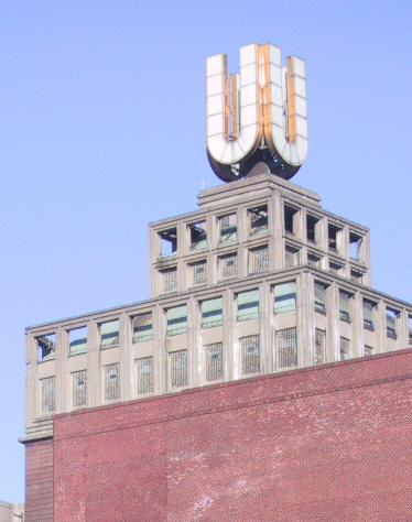 Dortmunder U